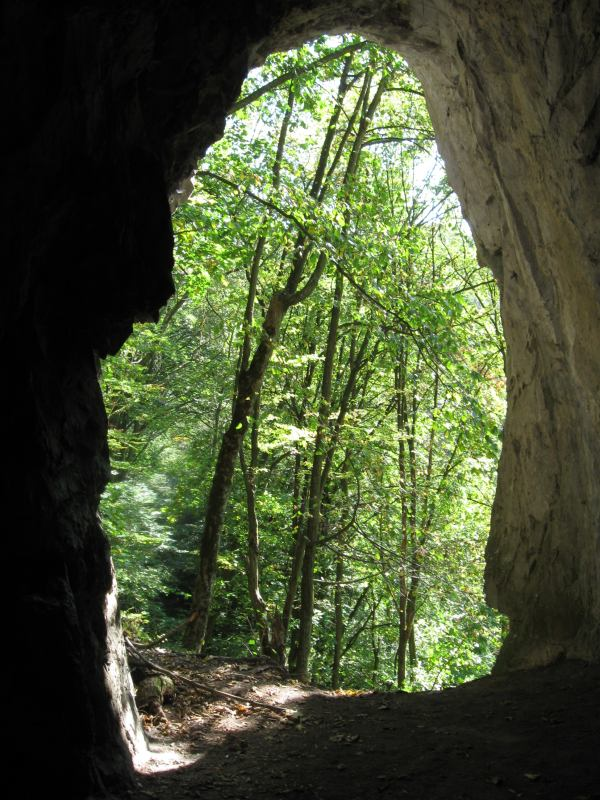 Průchozí jeskyně Kostelík